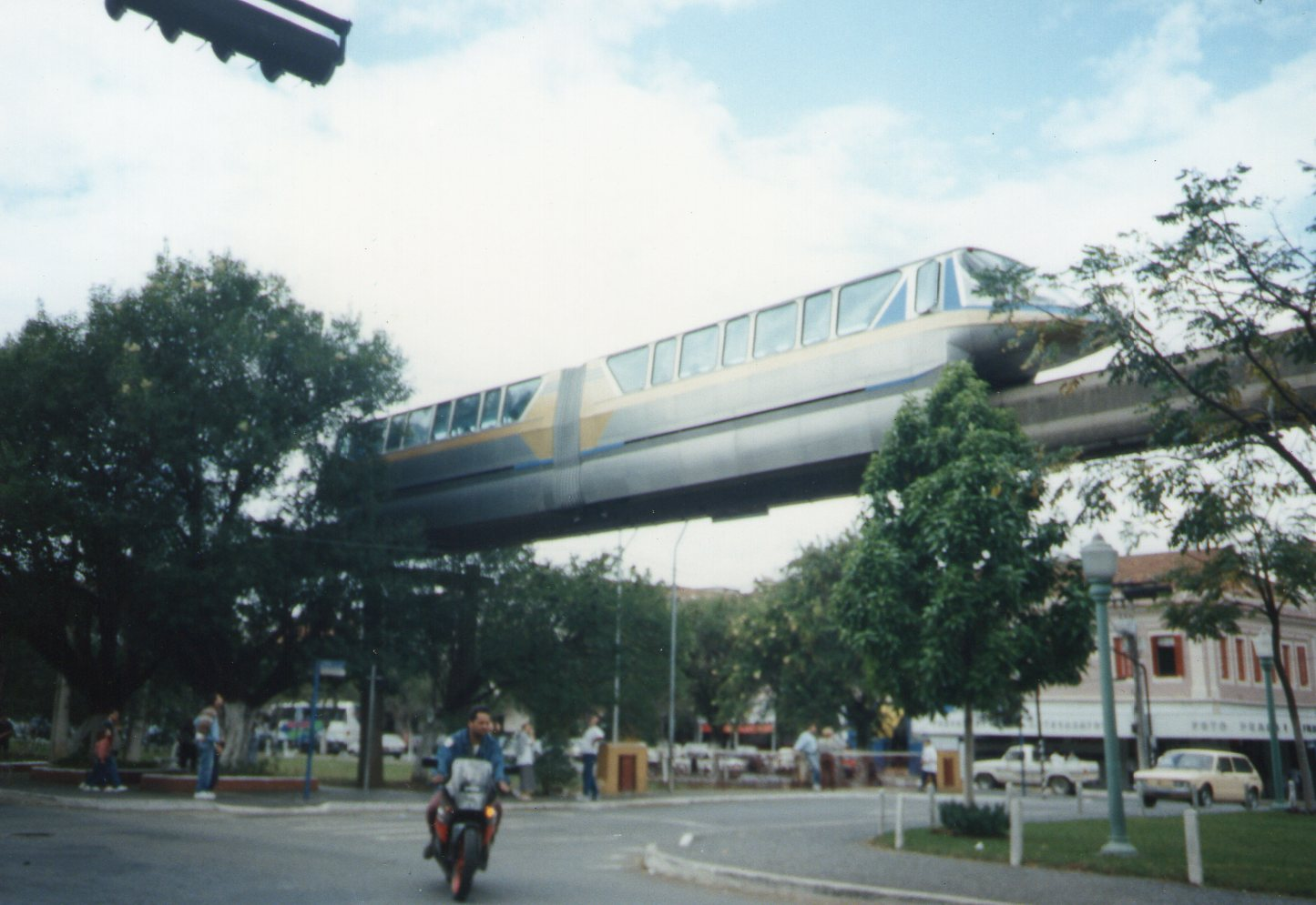 O monotrilho de Poços de Caldas, cidade brasileira do estado de MG.